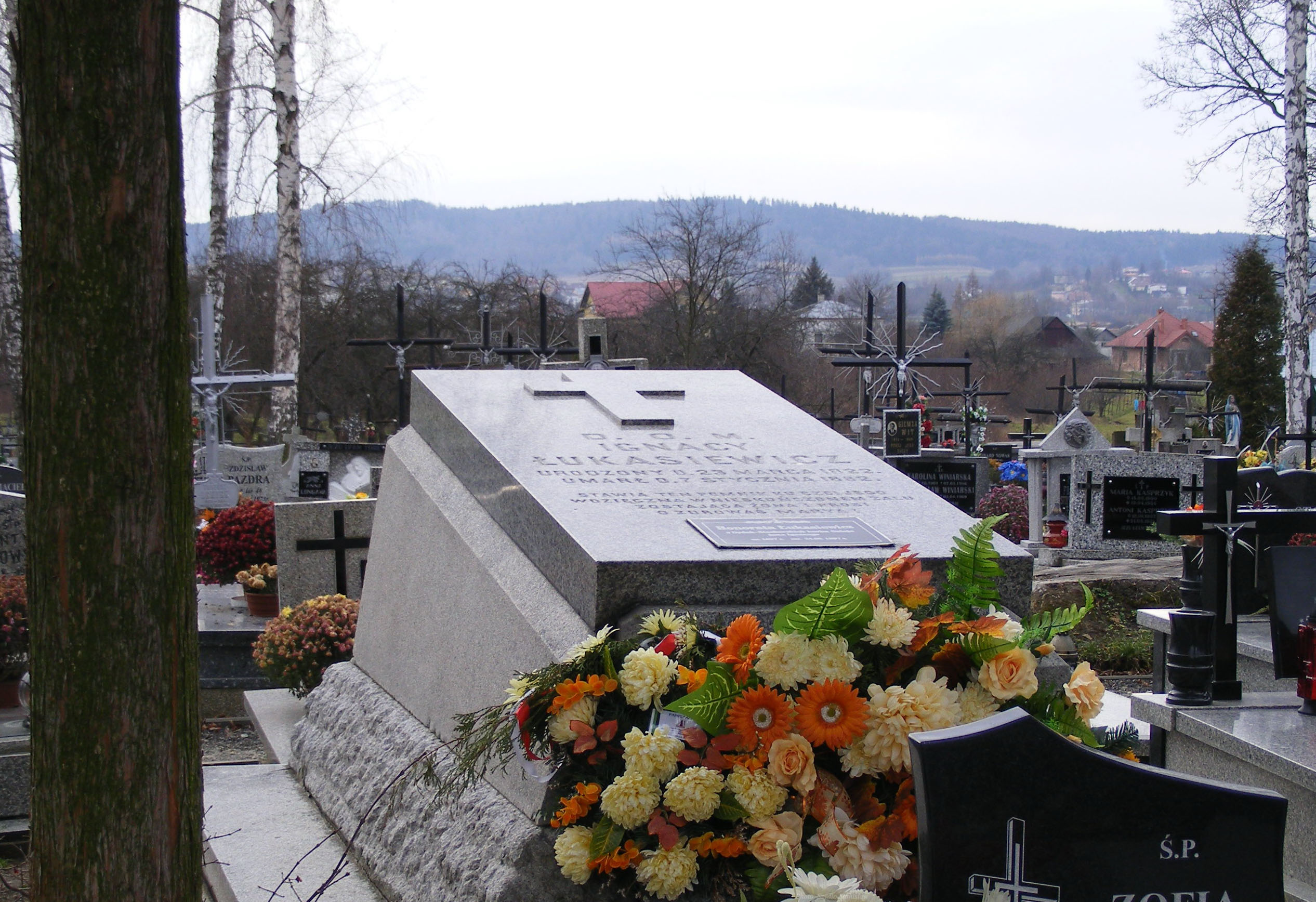 Grób Ignacego Łukasiewicza na cmentarzu w Zręcinie